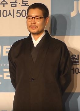 30일 오후 서울시 영등포구 여의도동 콘래드 서울 호텔에서 JTBC 새 금토드라마 ‘이태원 클라쓰’ 제작발표회가 열려 배우 박서준, 김다미, 유재명, 권나라가 참석해 포토타임을 갖고 있다.